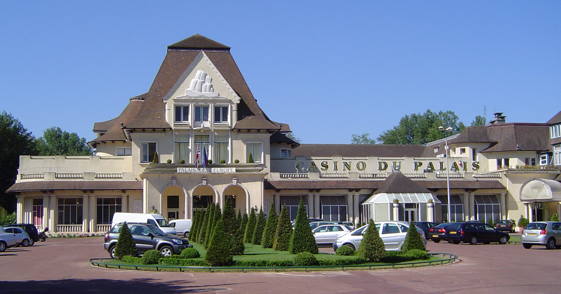 Photo prise par moi-même au Touquet le 15 juillet 2006